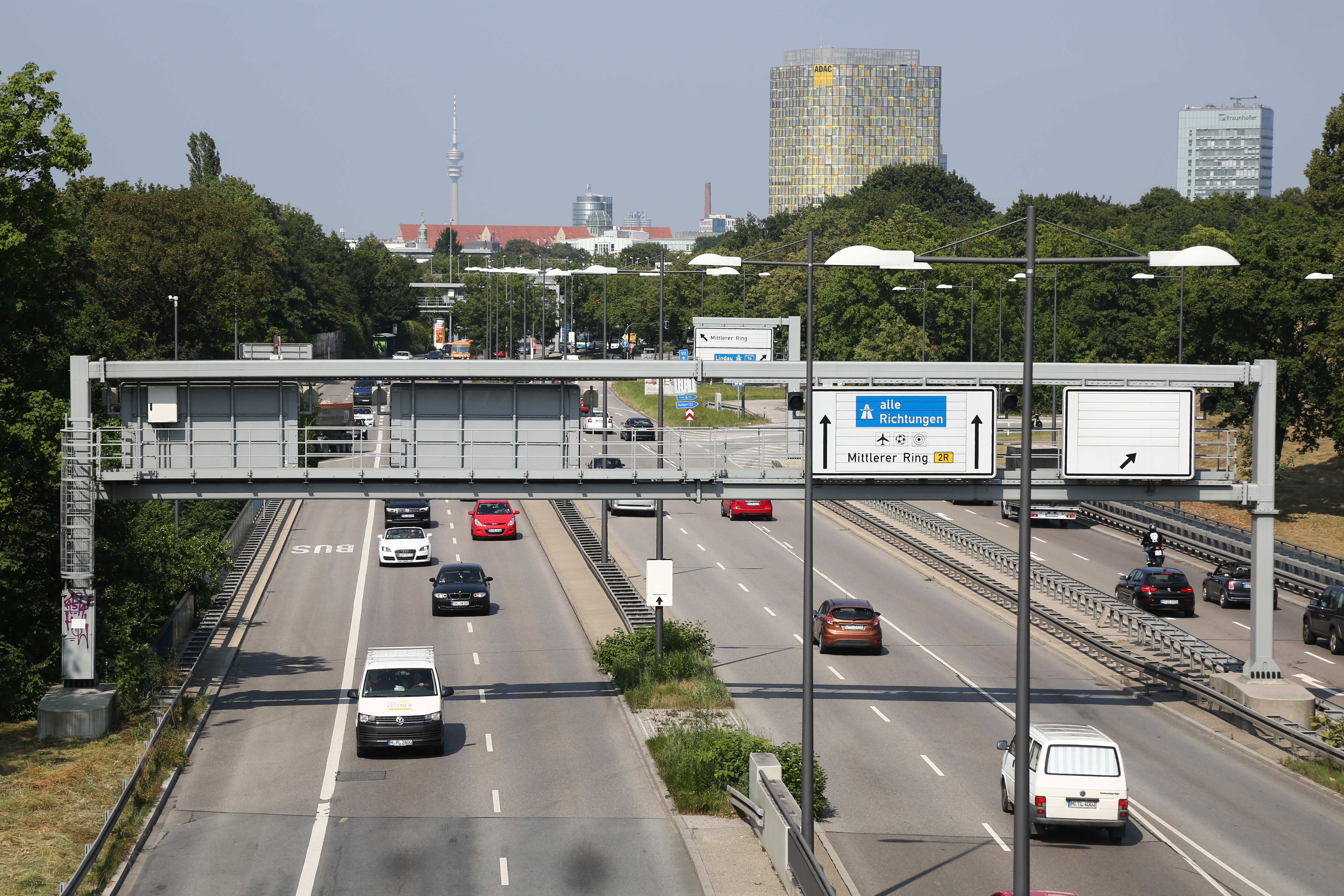 Garmischer Straße München, Teil des Mittleren Rings (Bundesstraße 2R) Blick nach Norden mit Olympiaturm und ADAC-Hochhaus